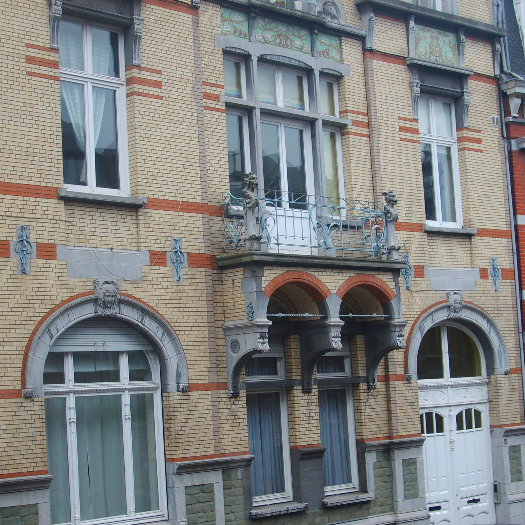 Rue César Franck, 32 Liège : mosaïques et sculptures (1901)